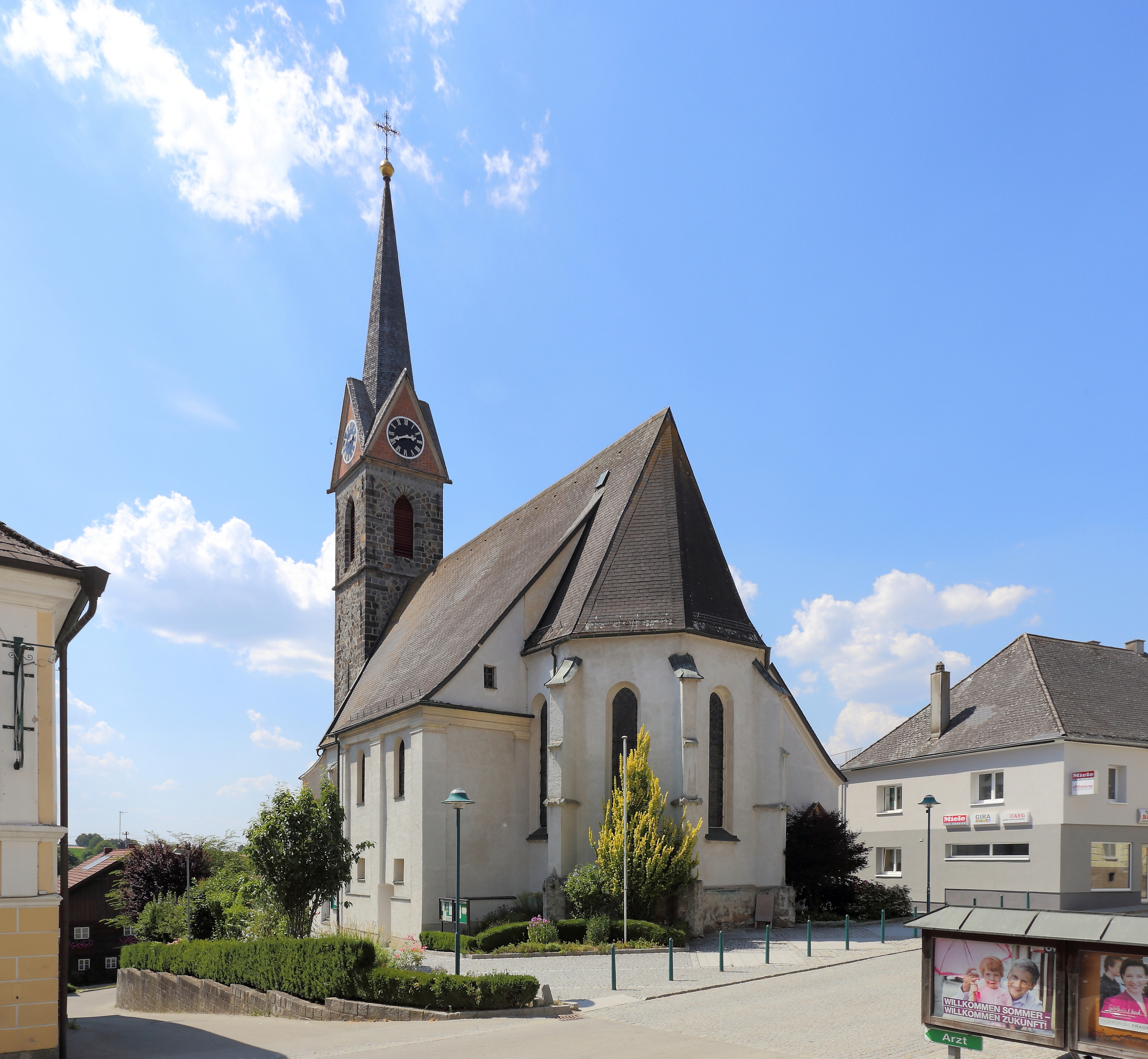 Katholische Pfarrkirche hl. Margareta der oberösterreichischen Gemeinde Eggerding. Ein einschiffiger gotischer Bau aus dem Ende des 15. Jahrhunderts. Der Turm mit Spitzhelm wurde 1900 von Matthäus Schlager errichtet.